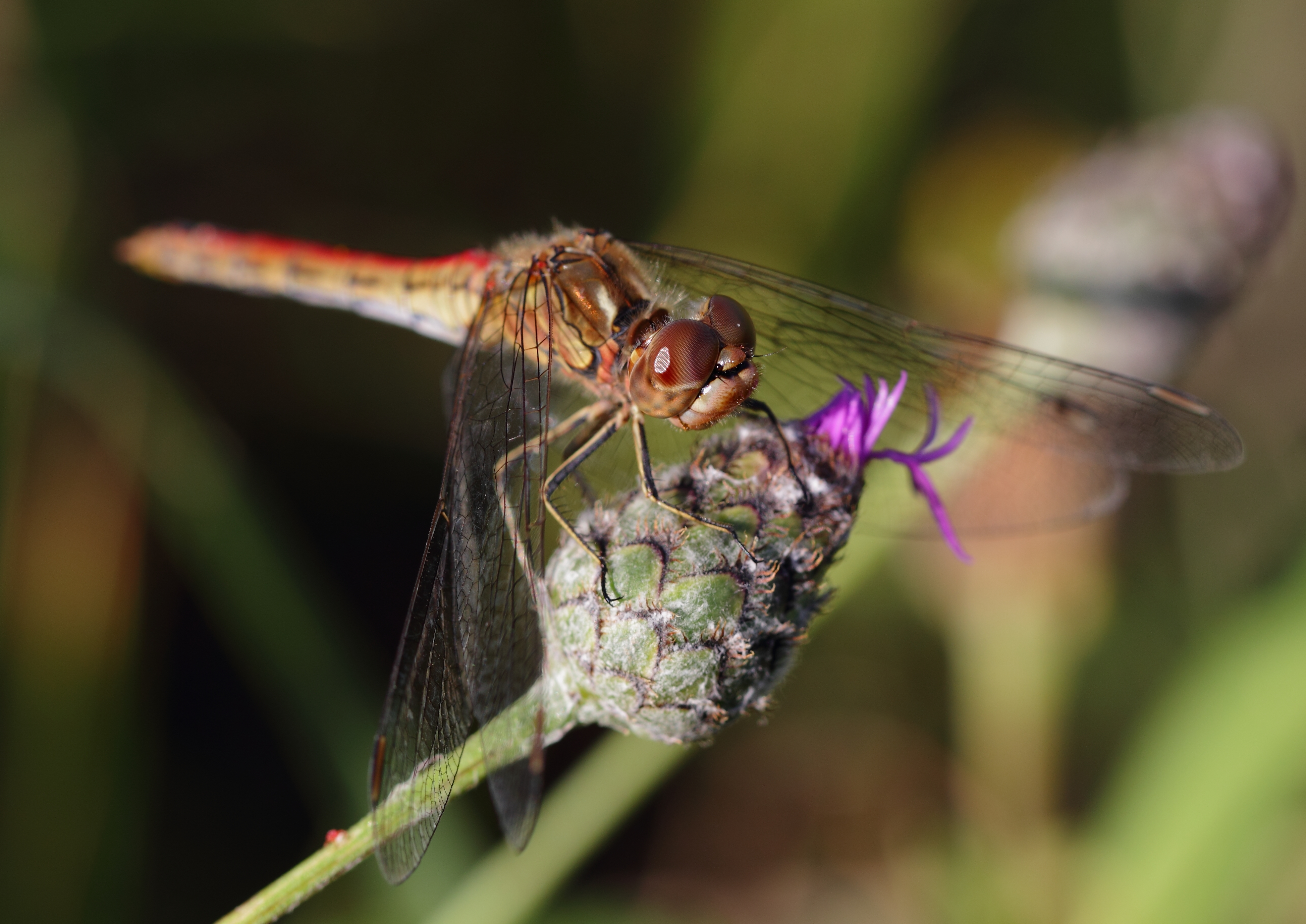 Große Heidelibelle Sympetrum striolatum in Eisenstadt-Umgebung.